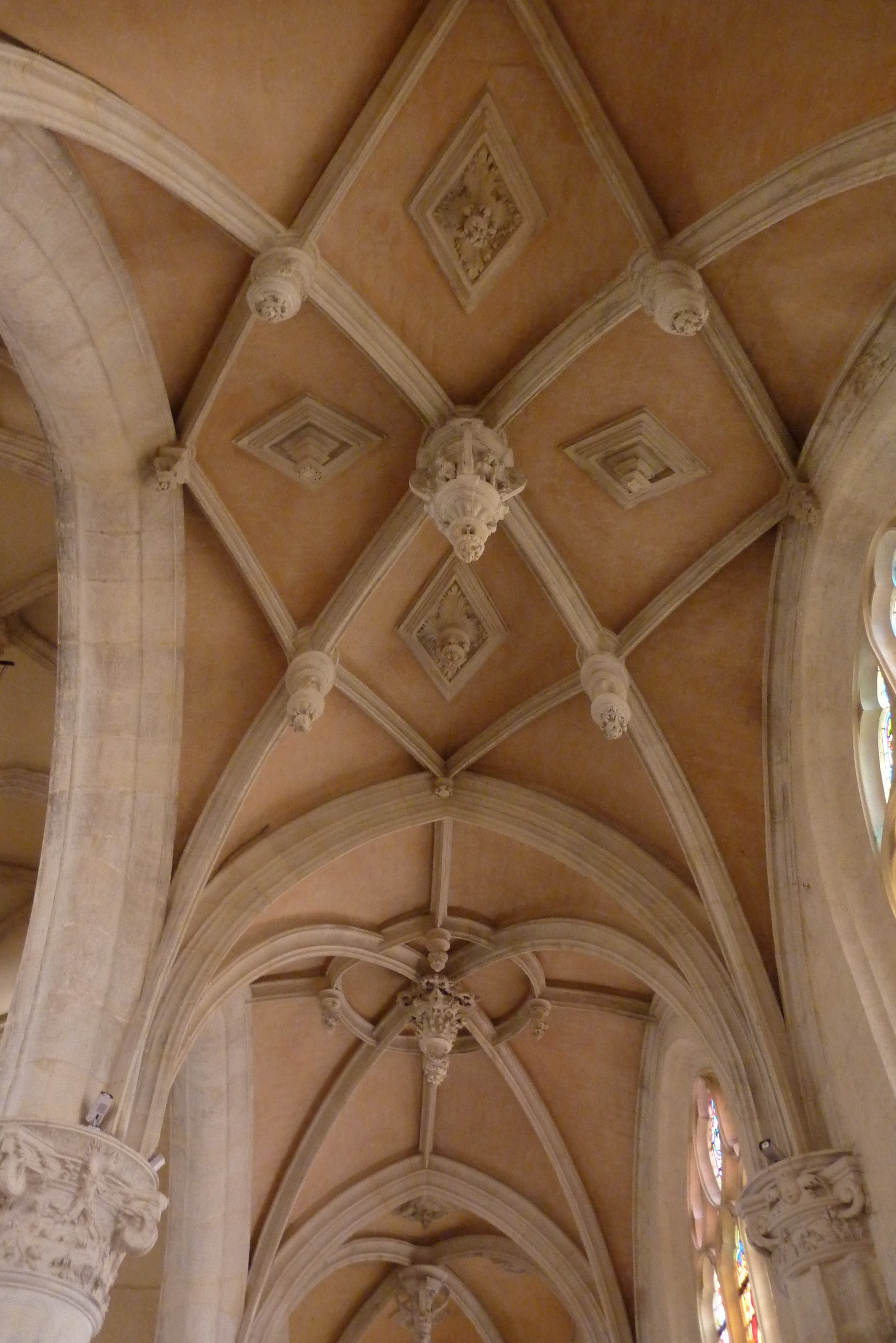 Katholische Pfarrkirche Saint-Justin in Louvres